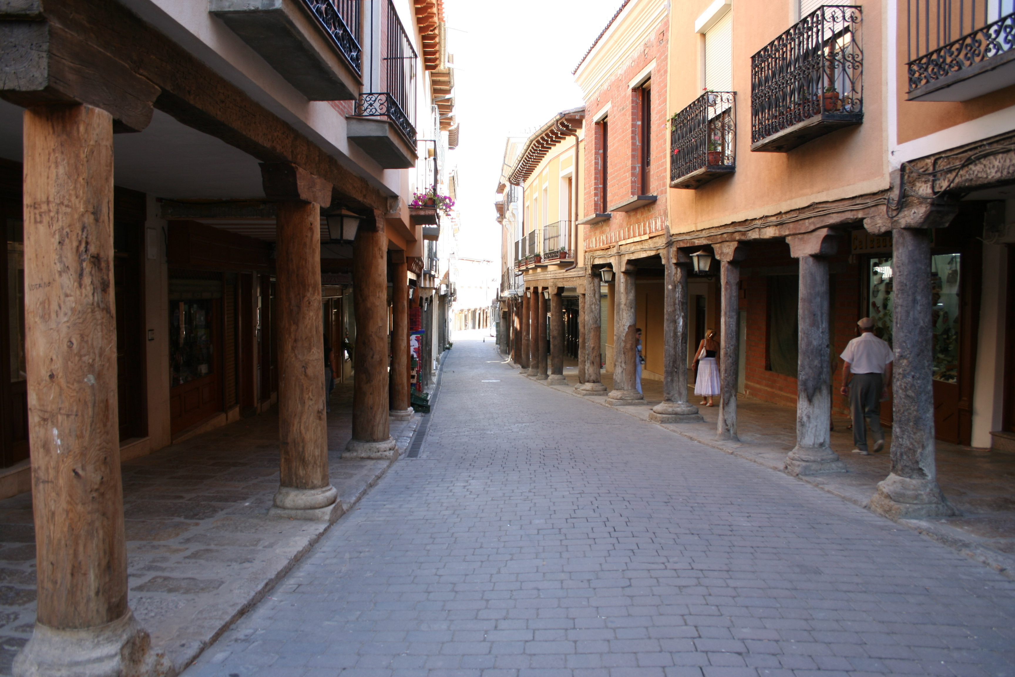 Soportales típicos castellanos en Medina de Rioseco.